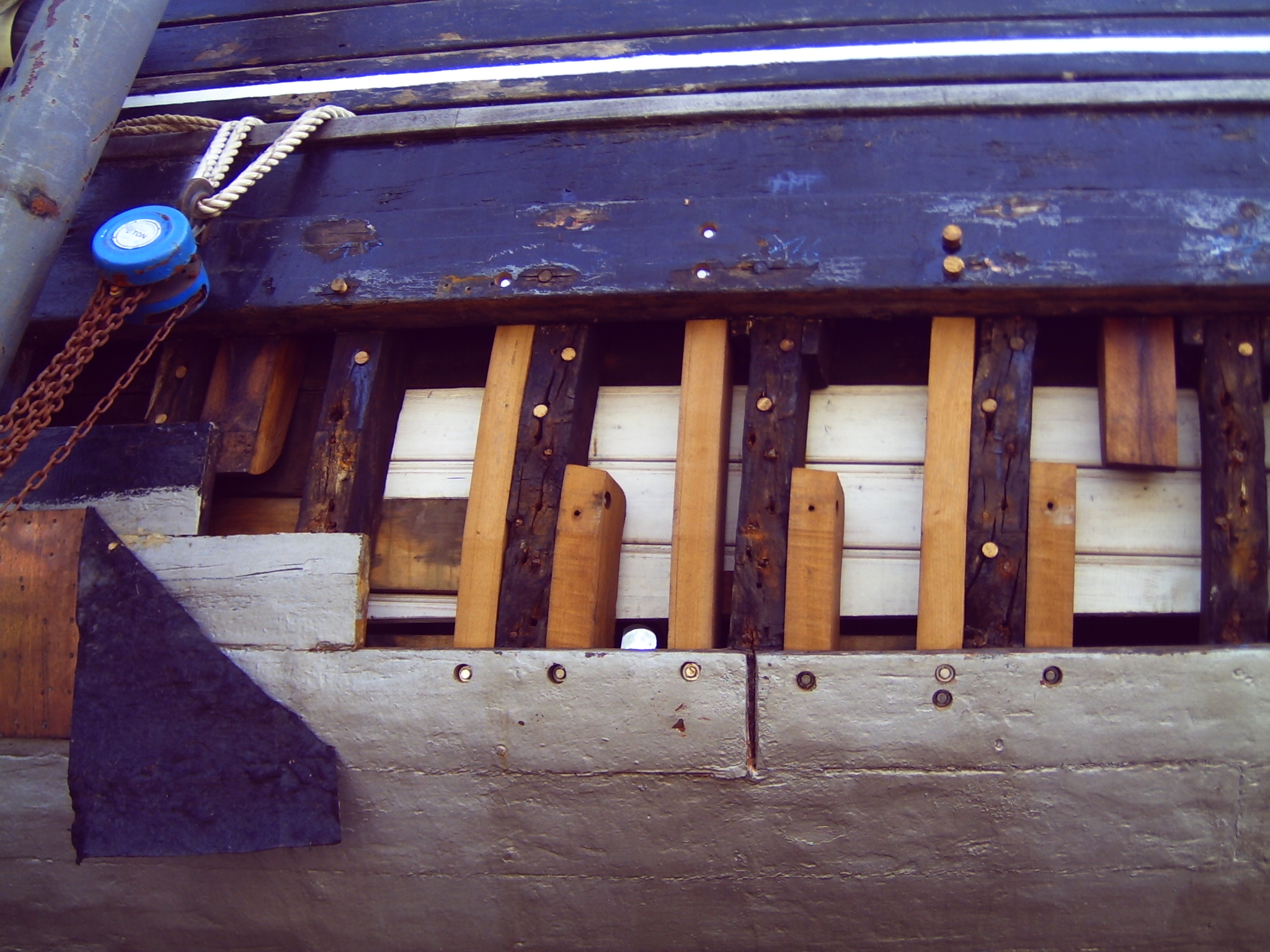 Nellie & Leslie, ein ehemaliger englischer Kutter